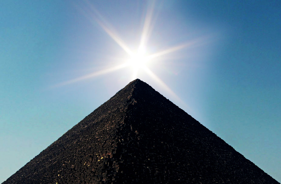 Khufu pyramid (Khufu) Date: March - 2005 © 2005 Nina Aldin Thune - Nina